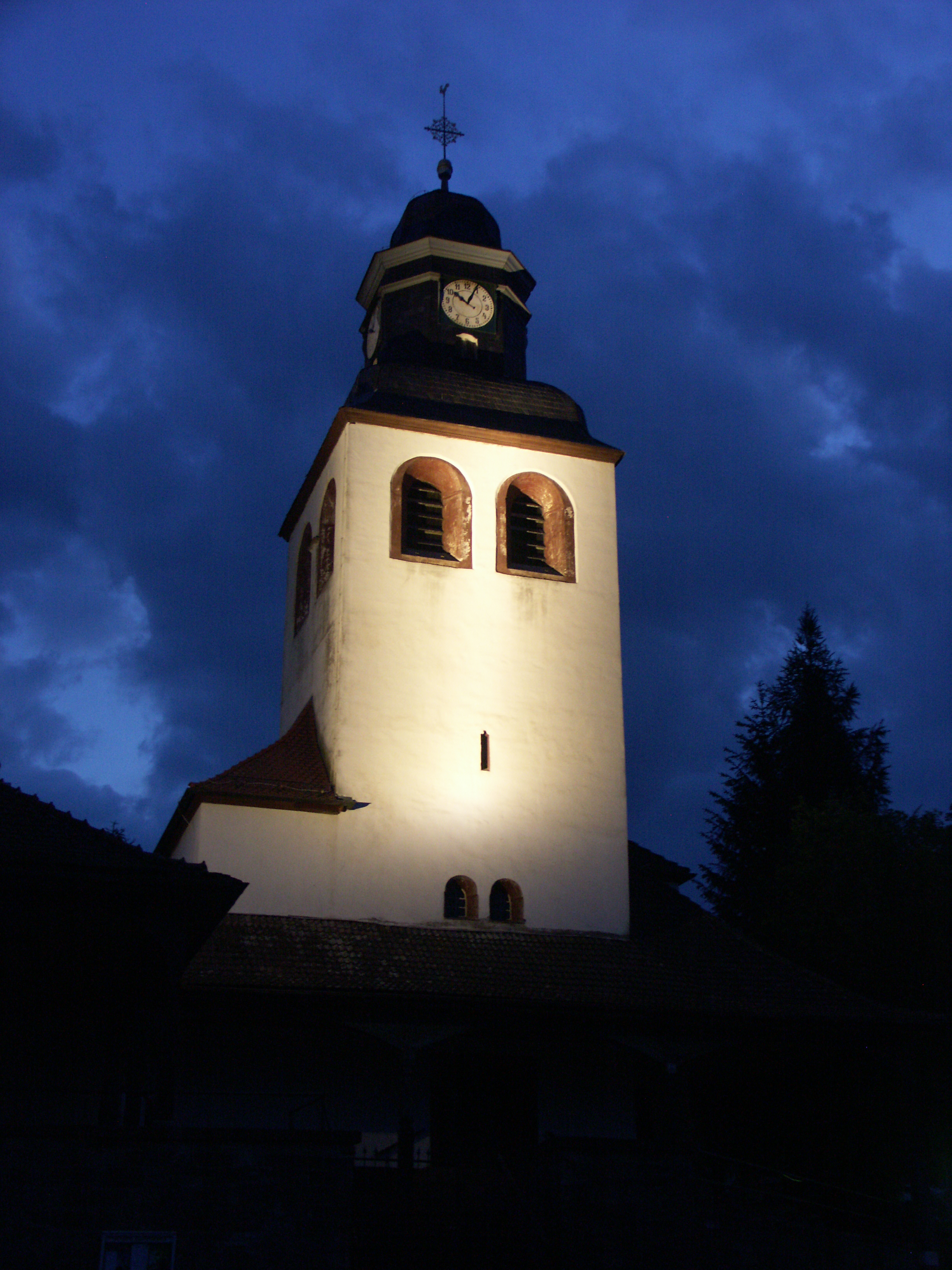 Anläßlich der 100 Jahrfeier der Tabarzer Kirche wurde eine Beleuchtung installiert, welche ab Pfingsten 2014 die Kirche anstrahlt